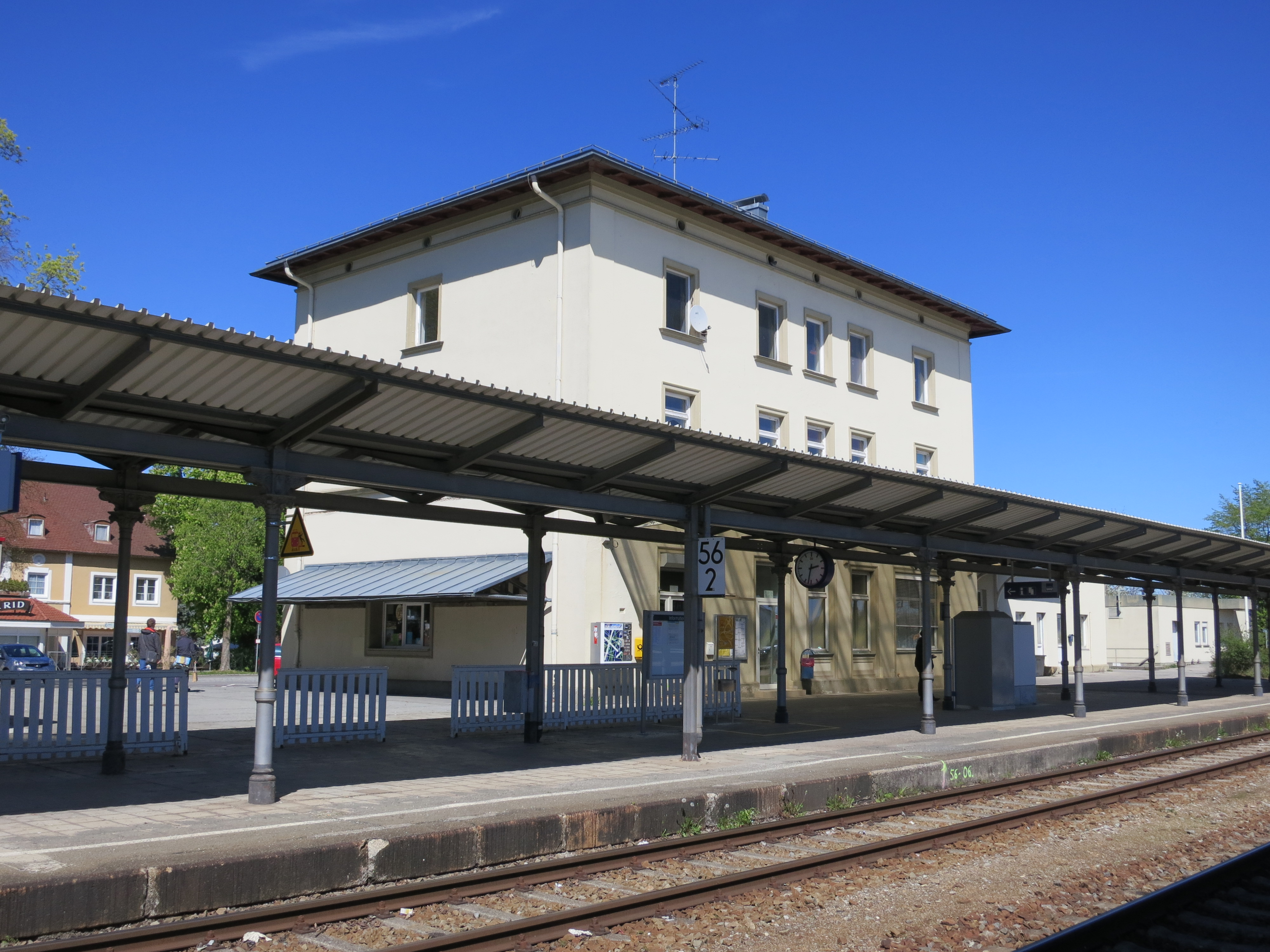 Empfangsgebäude des Bahnhofs Kaufering von der Gleisseite